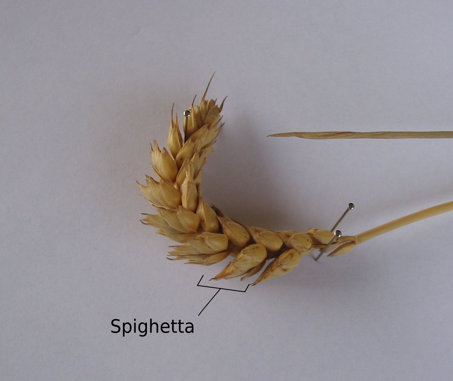 Spiga di grano (Triticum aestivum) piegata per mettere in evidenza le spighette